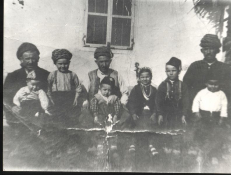 Sağ başta dedem (Veli), önünde amcam (Halil), solunda babam (Mehmet), onunda solunda halam (Fatmagül) bulunmaktadır. Diğerleri de komşularımızdır. Fotoğrafın 1947 yılında çekildiği zannedilmektedir. Kaynak: Sabri Sever